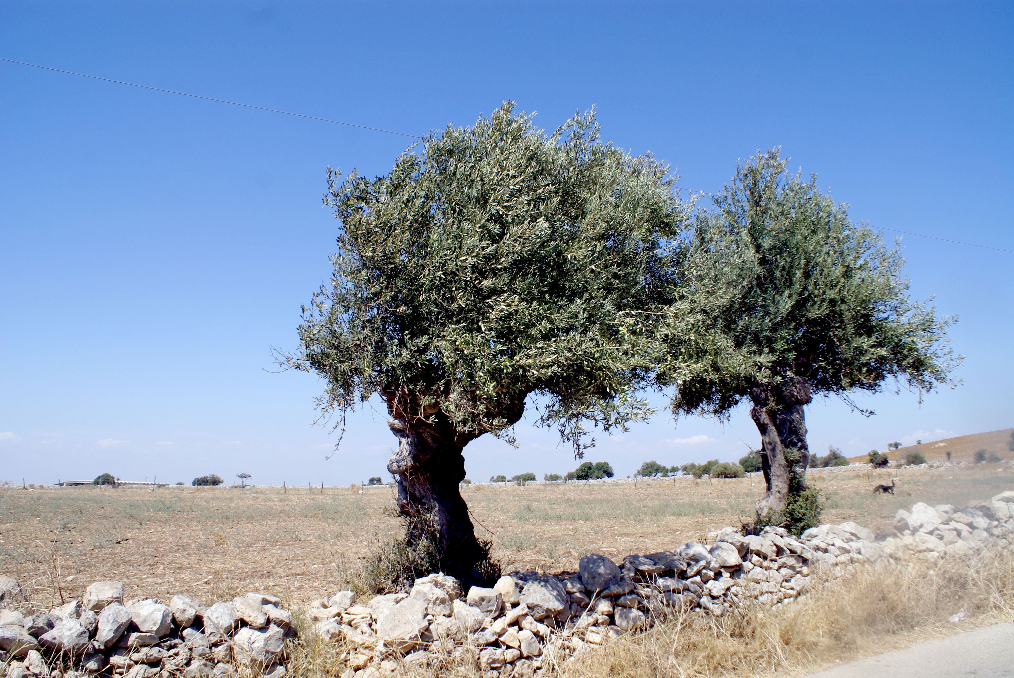 Ulivi, i testimoni - Ragusano